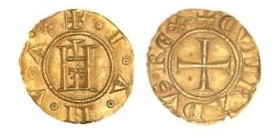 Italia, Genova. Primo periodo: IANVA (1252). Genovino d'oro (3,49 g). Coniato a nome di Corrado II Castello; intorno +•I•A•N•V•A (rosa o tre anelletti) Croce patente; intorno +•CVNRADVS•REX• Italy, Genoa. first coinage: IANVA (1252). Genovino d'oro (3,49 g). Struck in the name of Holy Roman emperor Conrad II, Castle; legend +•I•A•N•V•A, (rose or three annulet ?) Cross pattée; legend +•CVNRADVS•REX•